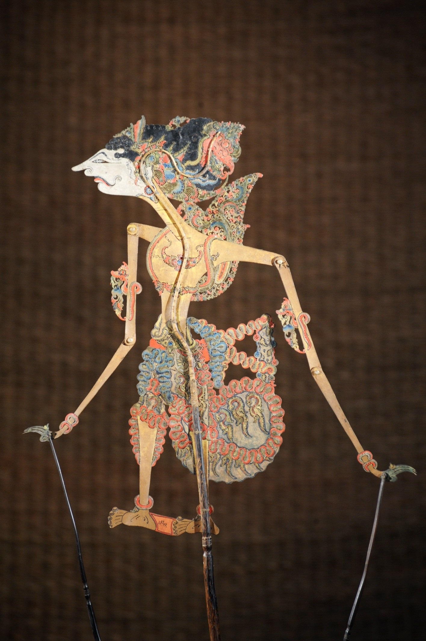 Schattenfigur des Wayang-Kulit Schattentheaters, Anfang 20Jh., Java